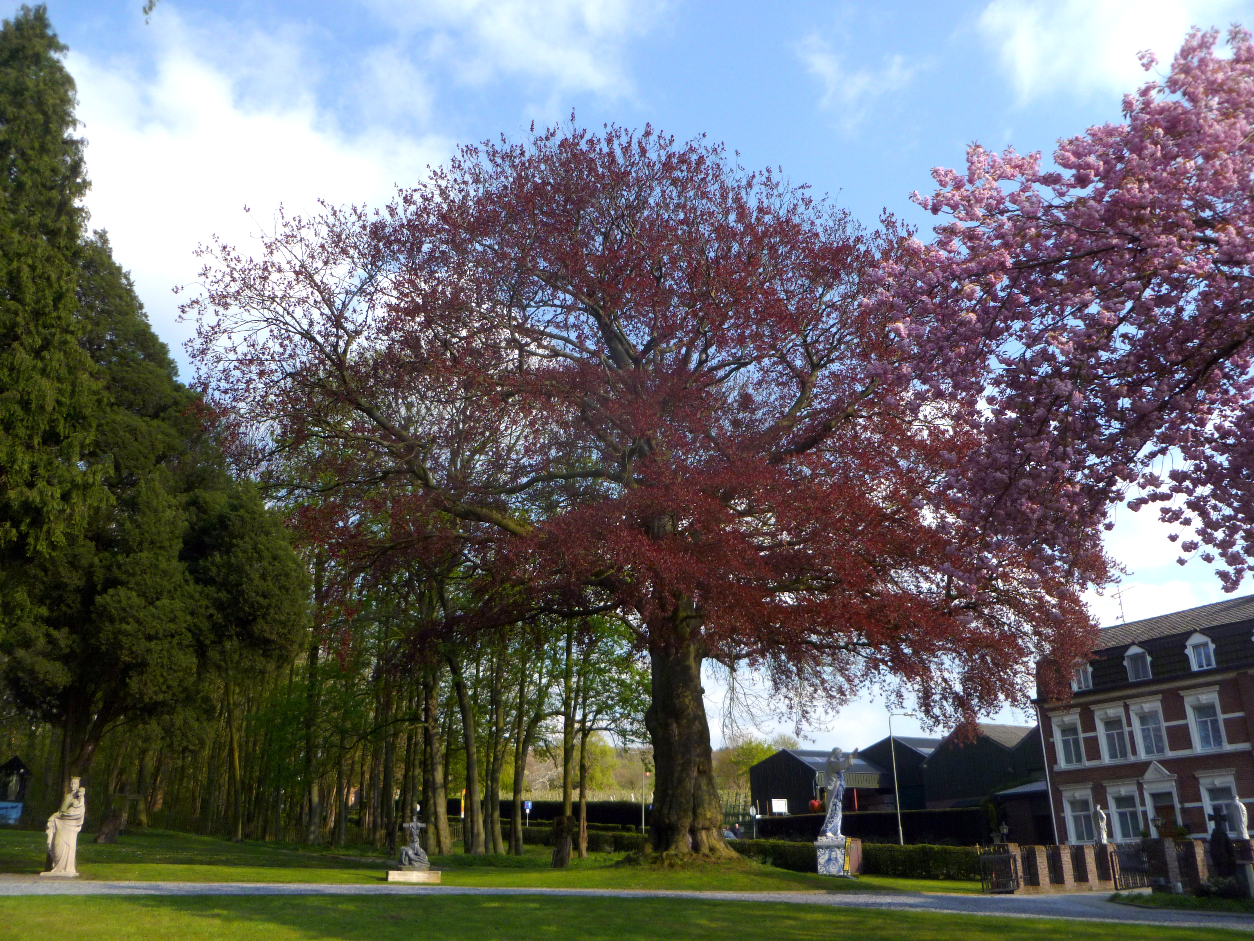 Blutbuche im Park von Haus de Esch, Vaals, mehr als 400 Jahre alt und evtl. älteste Buche der Gemeinde Vaals